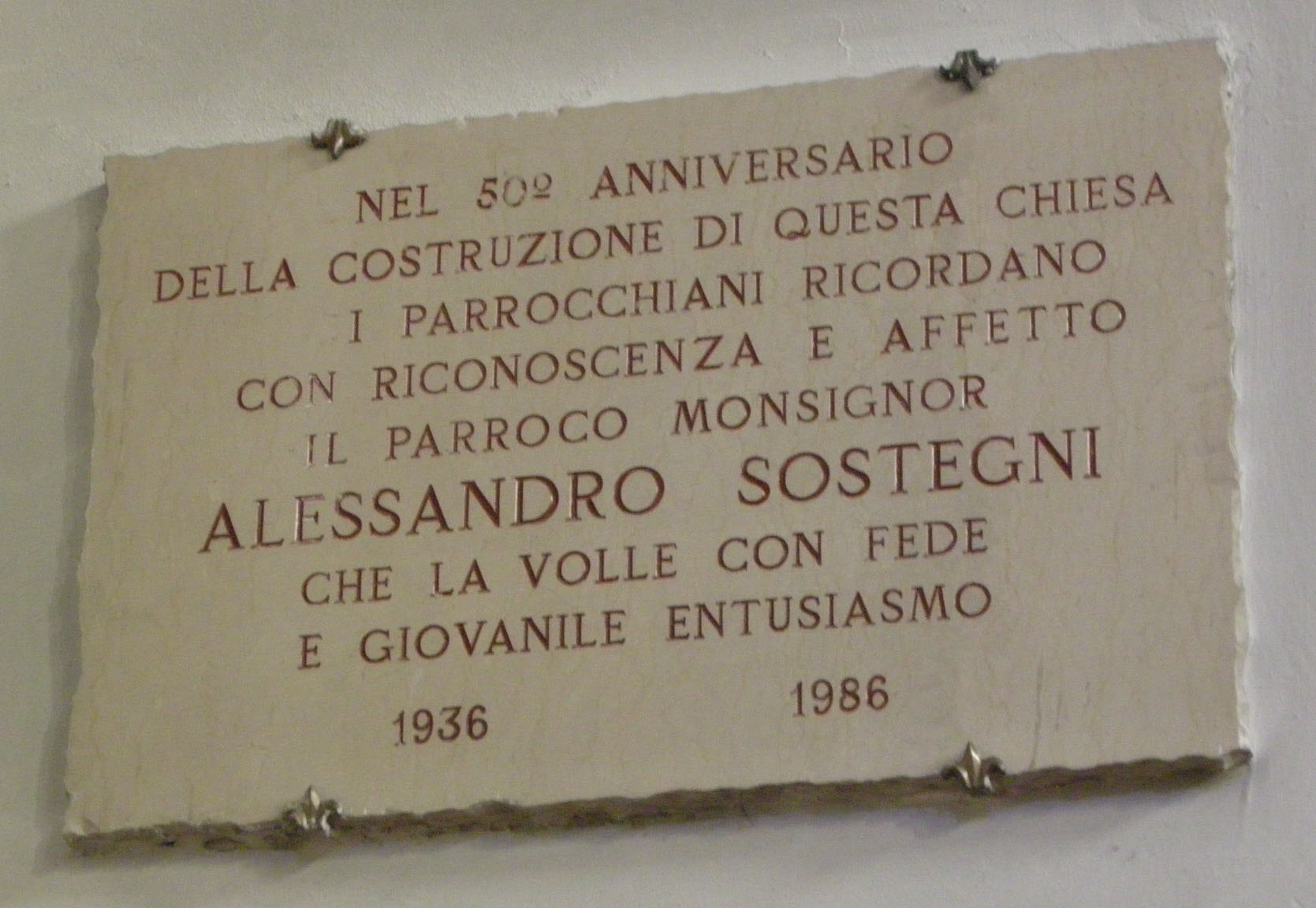 Chiesa dell'immacolata (Firenze) 04 lapide alessandro sostegni